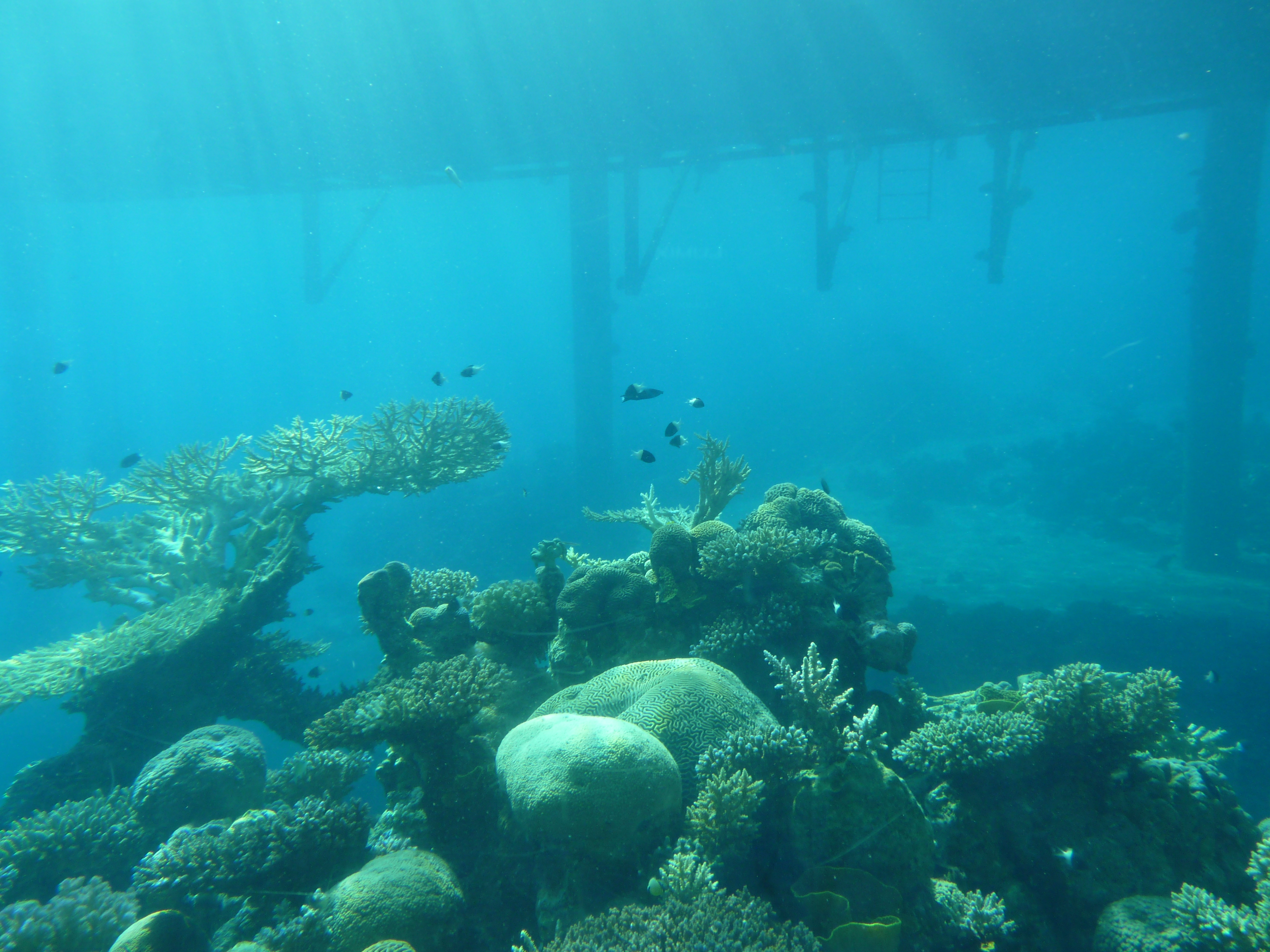 P1080793 Eilat